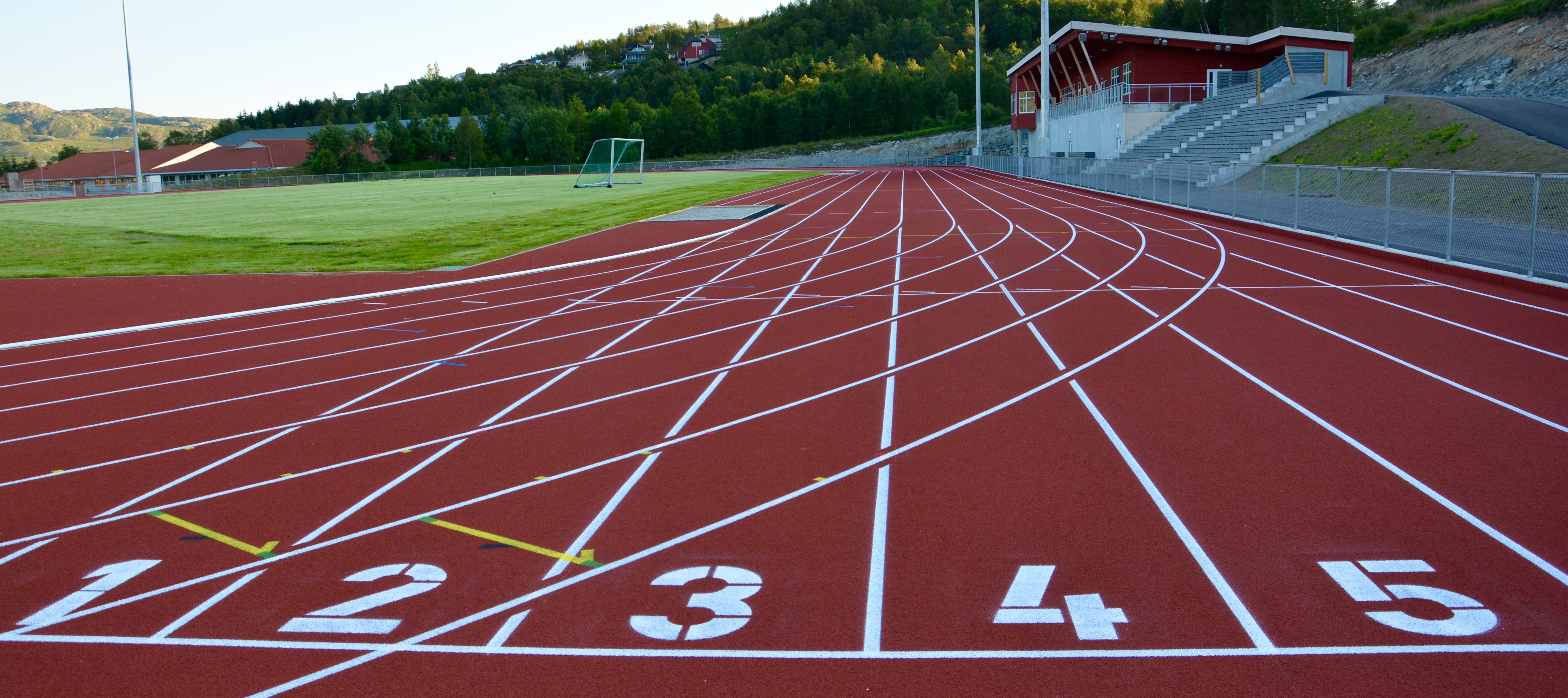 Ny løpebane og klubbhus stod klart i juli 2015